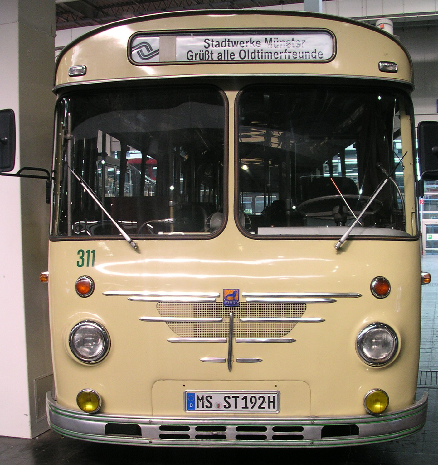 Nutzfahrzeug-IAA Hannover 2004, Büssing Stadtbus aus Münster (genauere Informationen habe ich leider nicht).